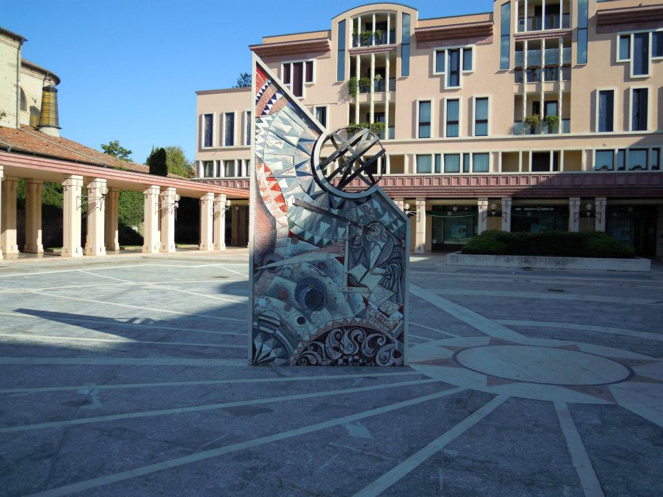 Piazza del Sole e della Pace (o Piazza della Meridiana) ad Abano Terme (provincia di Padova)